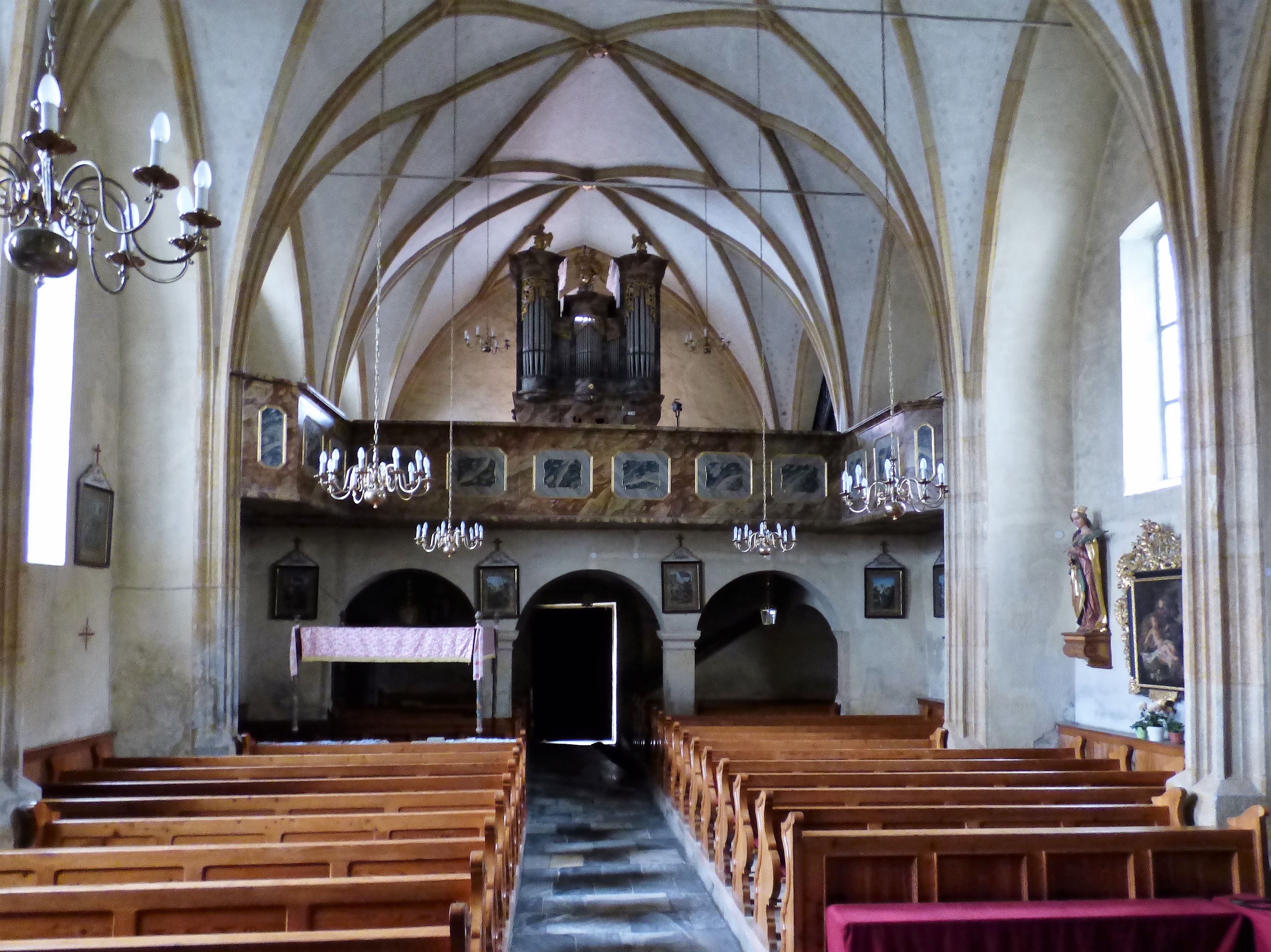 Innenansicht Kirche Mariae Himmelfahrt, St. Marein (Gemeinde Neumarkt), Steiermarkt